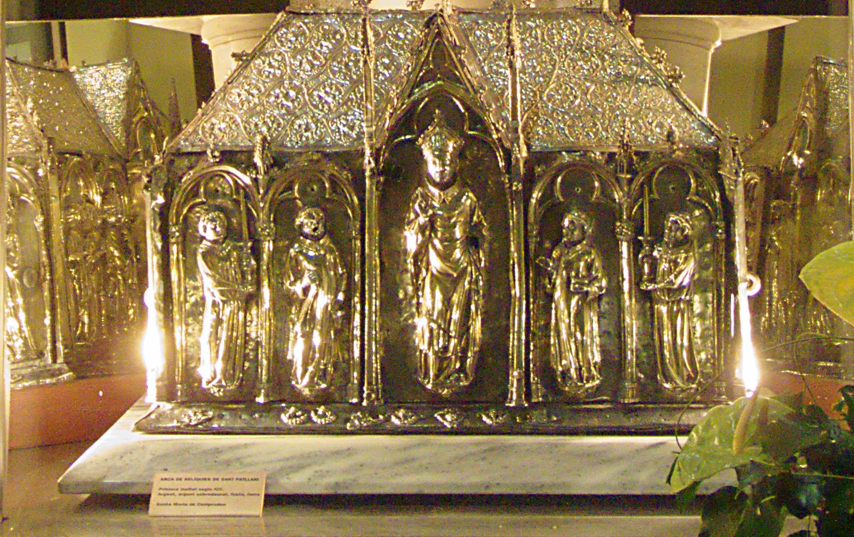 Arca de relíquies de Sant Patllari, Església Santa Maria, Camprodon (Ripollès, Girona, Catalunya, Espanya)